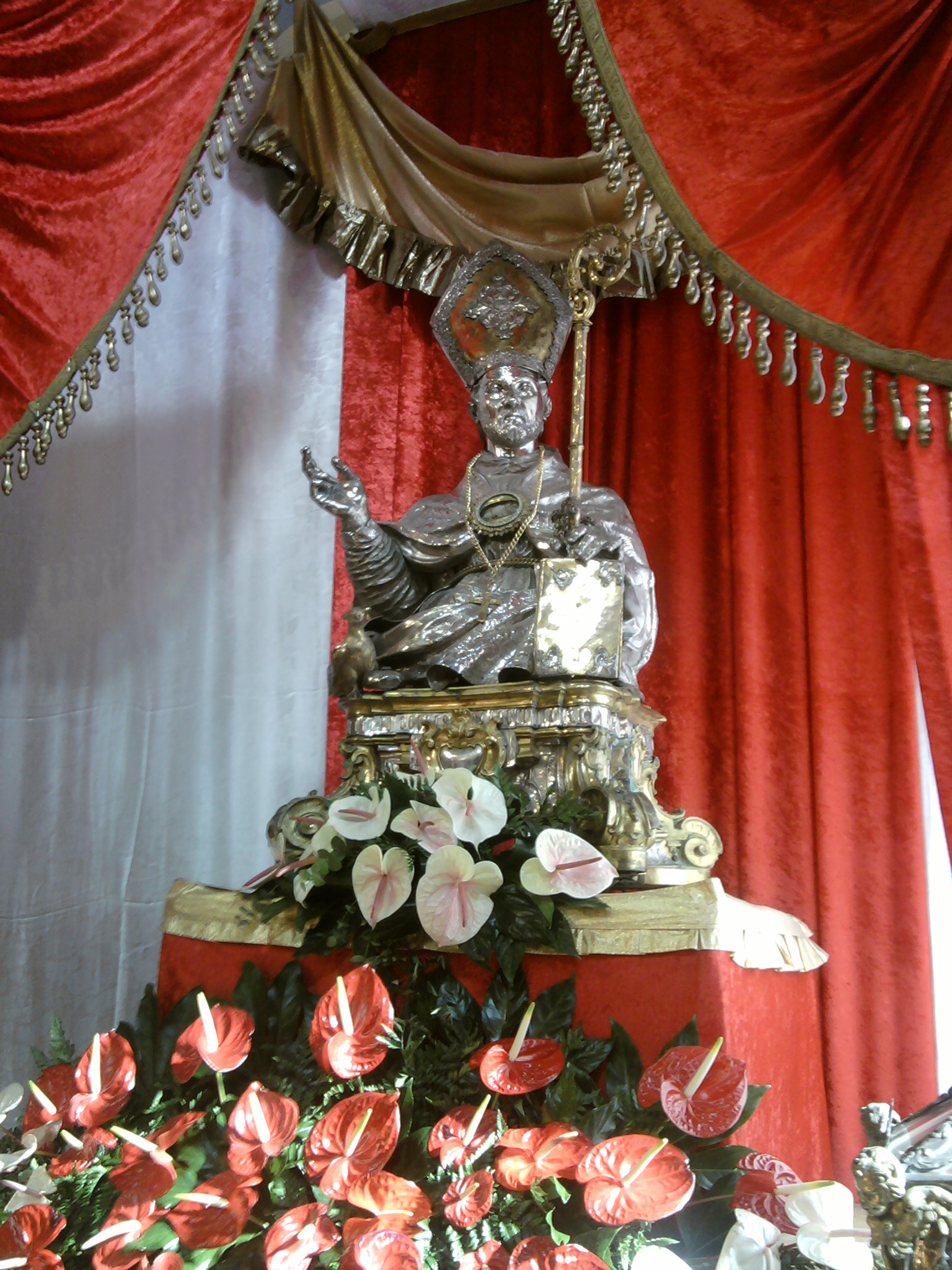 Avellino: Busto Reliquario di San Modestino esposto in Cattedrale.